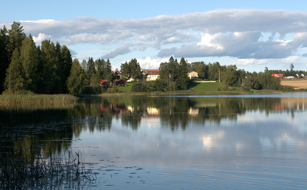 Nordbytjernet med Romerike folkehøgskole i bakgrunnen.